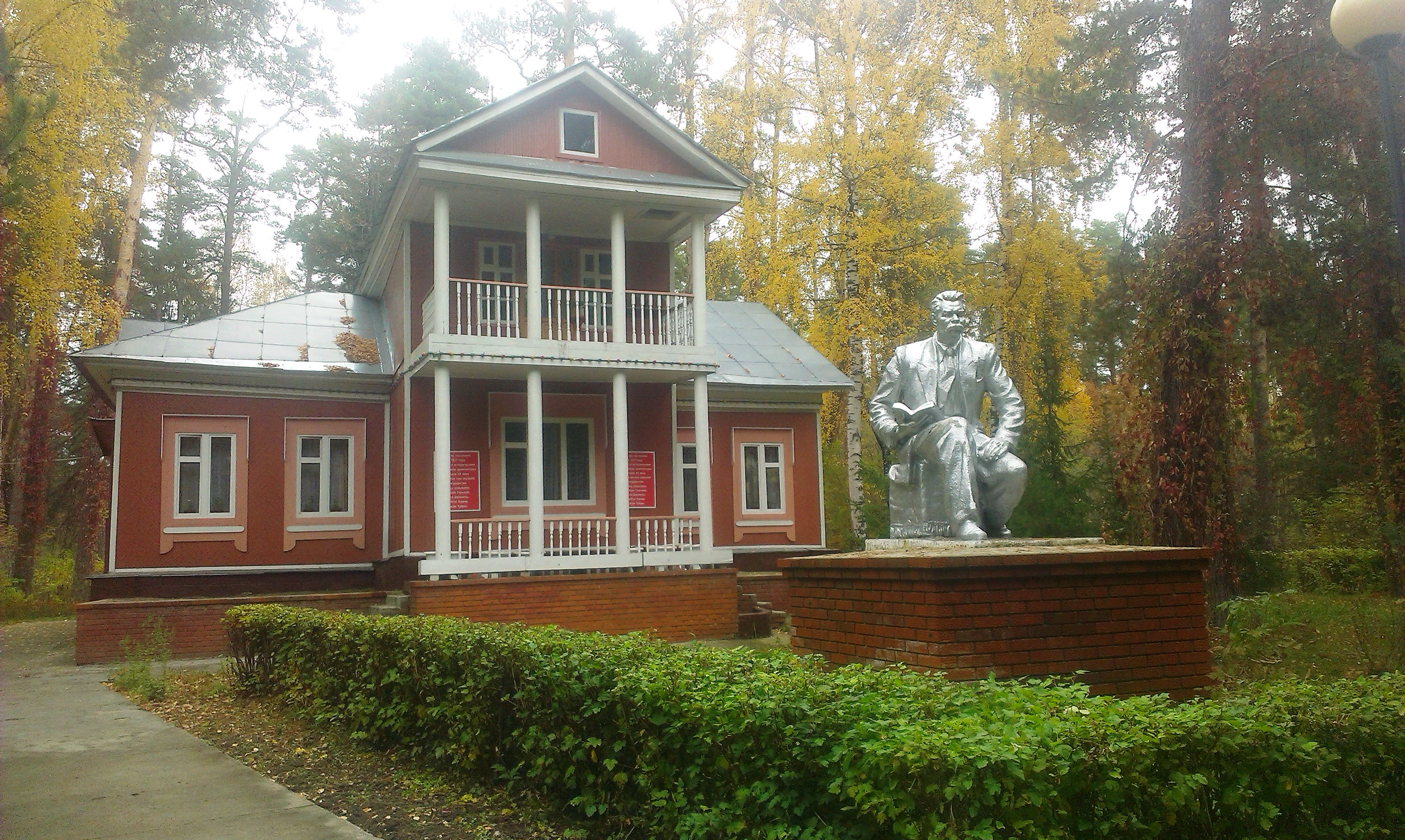 Васильево (Зеленодольский район)